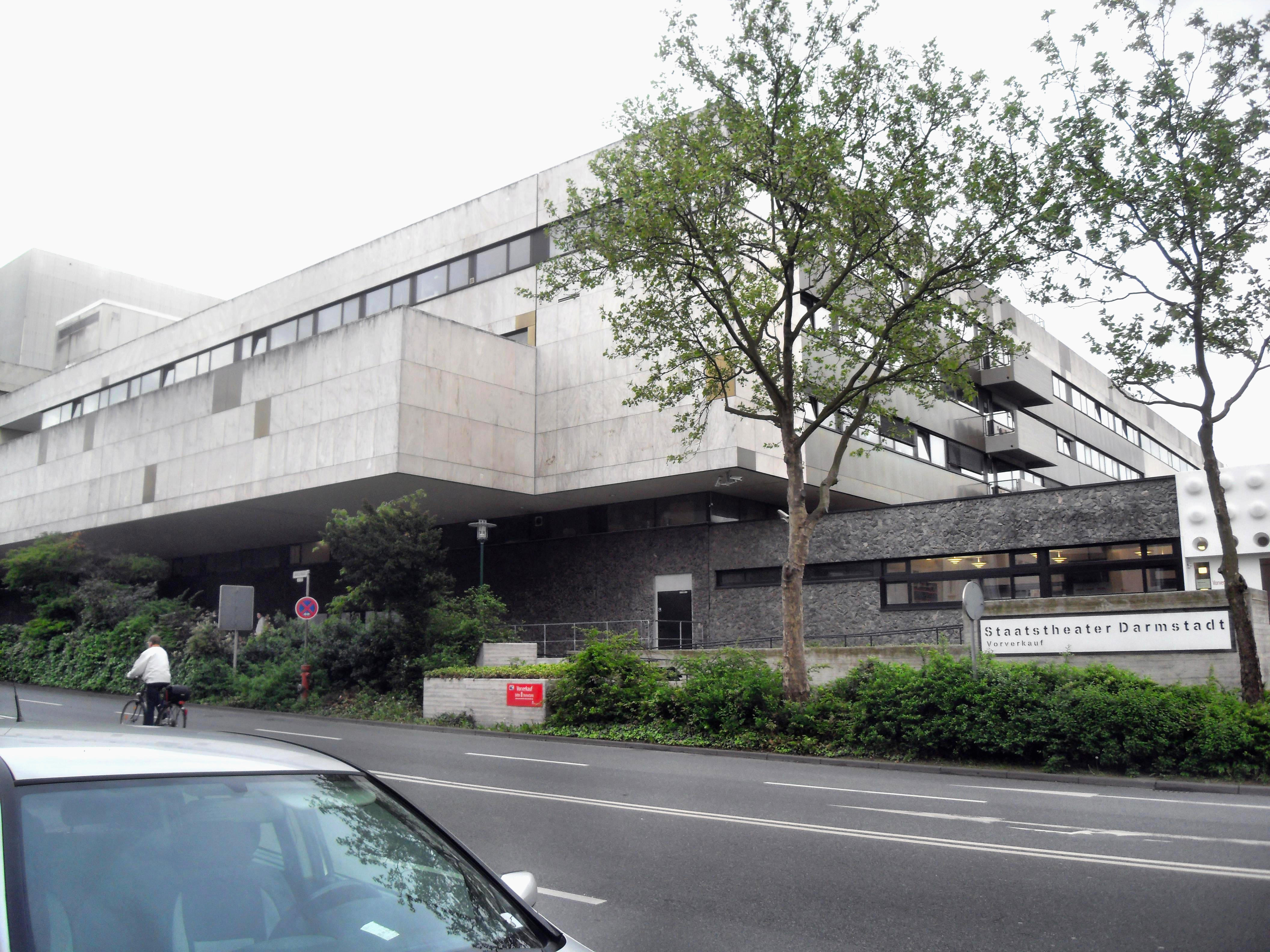 Das Staatstheater Darmstadt von der Bundesstraße 26 in Hessen (Deutschland) aus